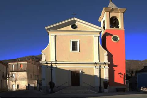 chiesa